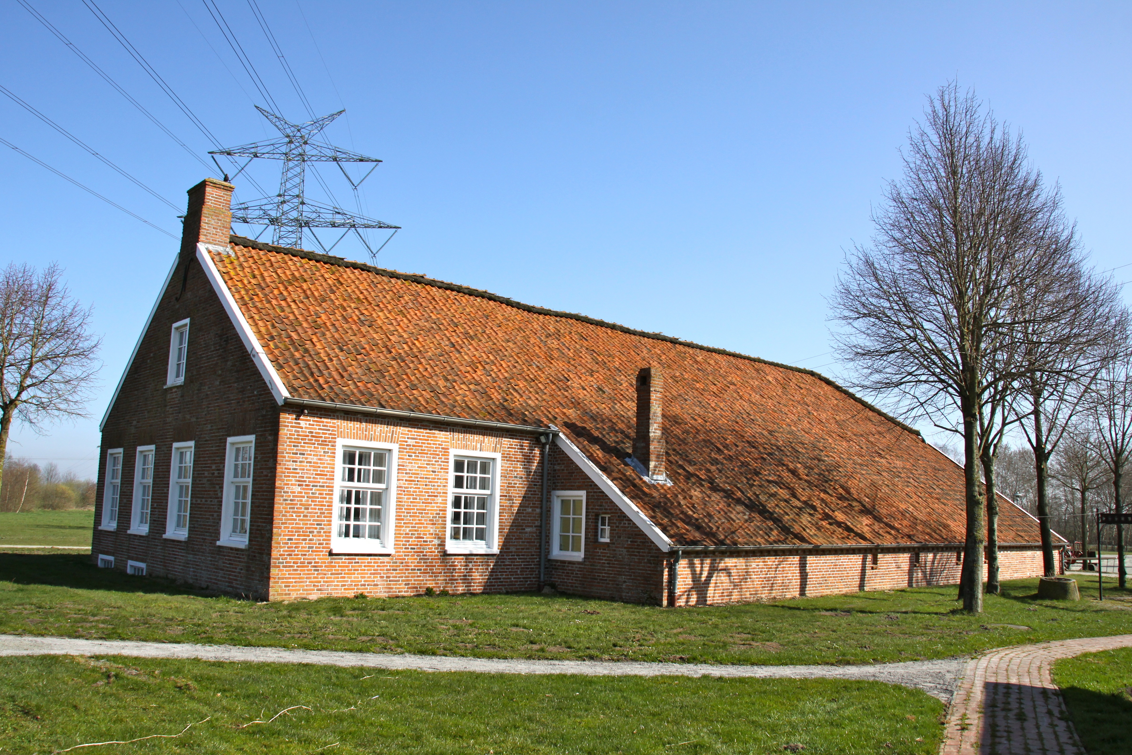 Gulfhof im Freizeitpark Grootegaste